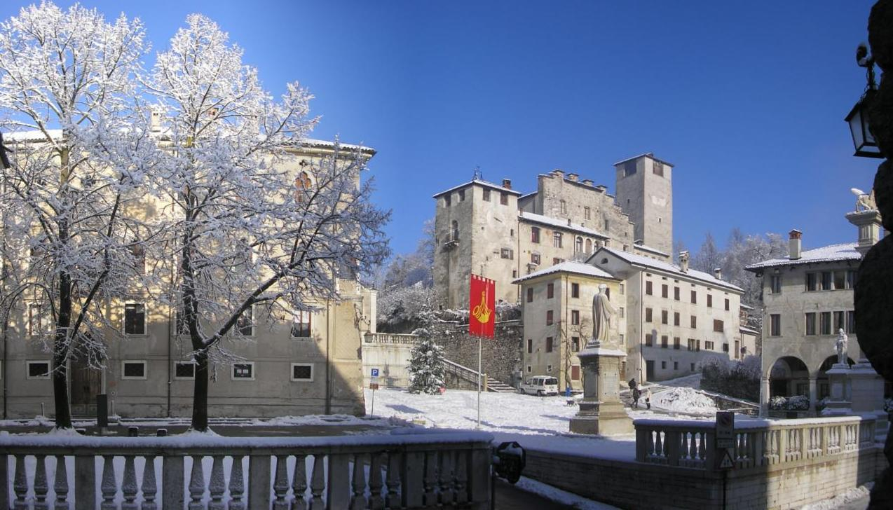 La città vecchia di Feltre sotto l'ultima neve di dicembre. Foto di Riccardo Sartor